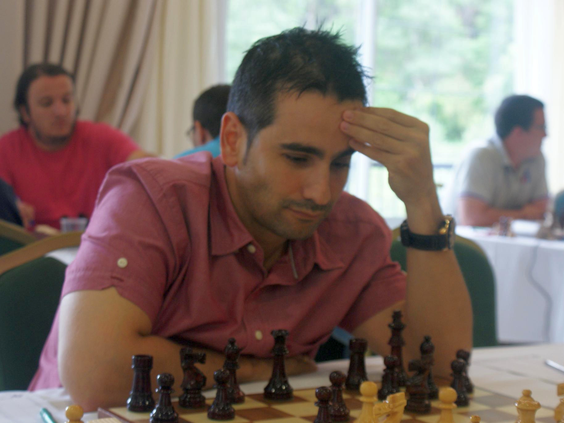 GM Alexis Cabrera, 31è Open Internacional d'Andorra, Hotel Sant Gothard, Ronda 6 - 25/07/2013